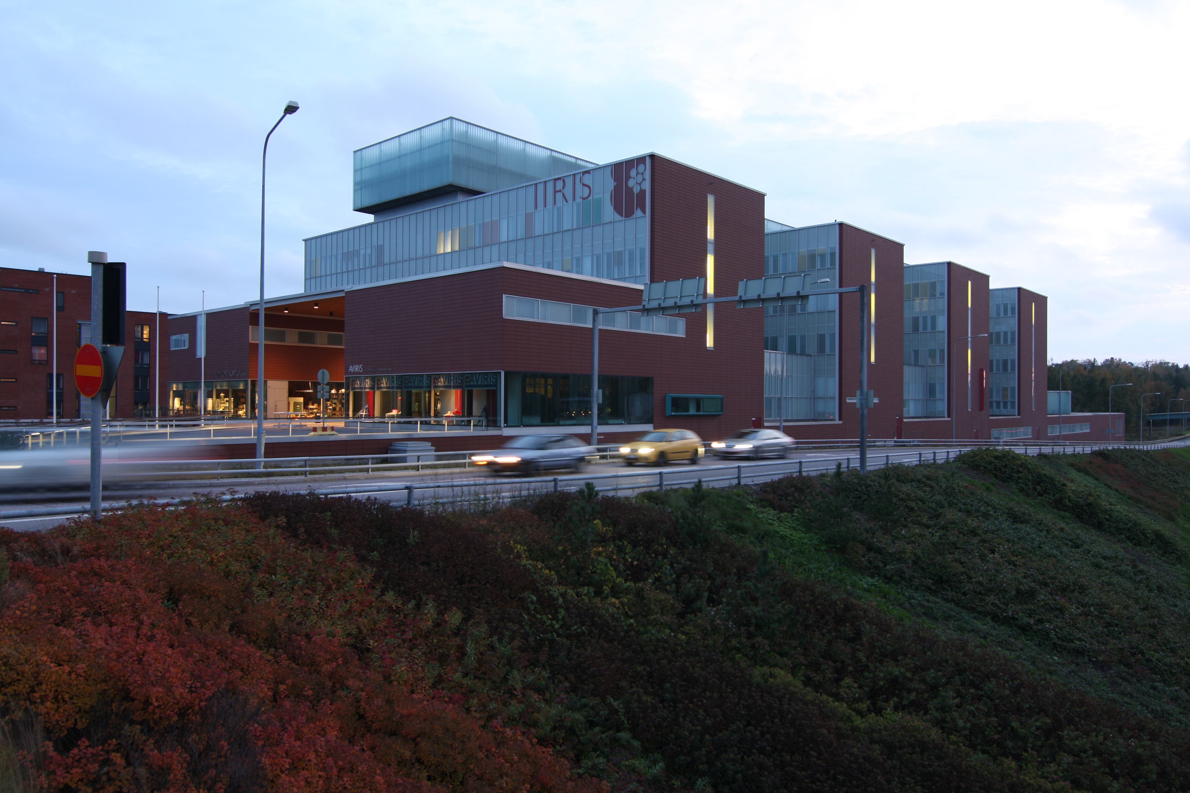 Näkövammaisten palvelu- ja toimintakeskus Iiris